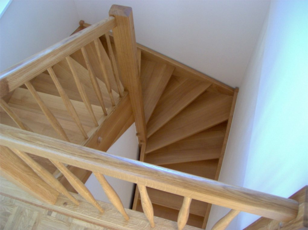 Holztreppe Viertelgewendelt